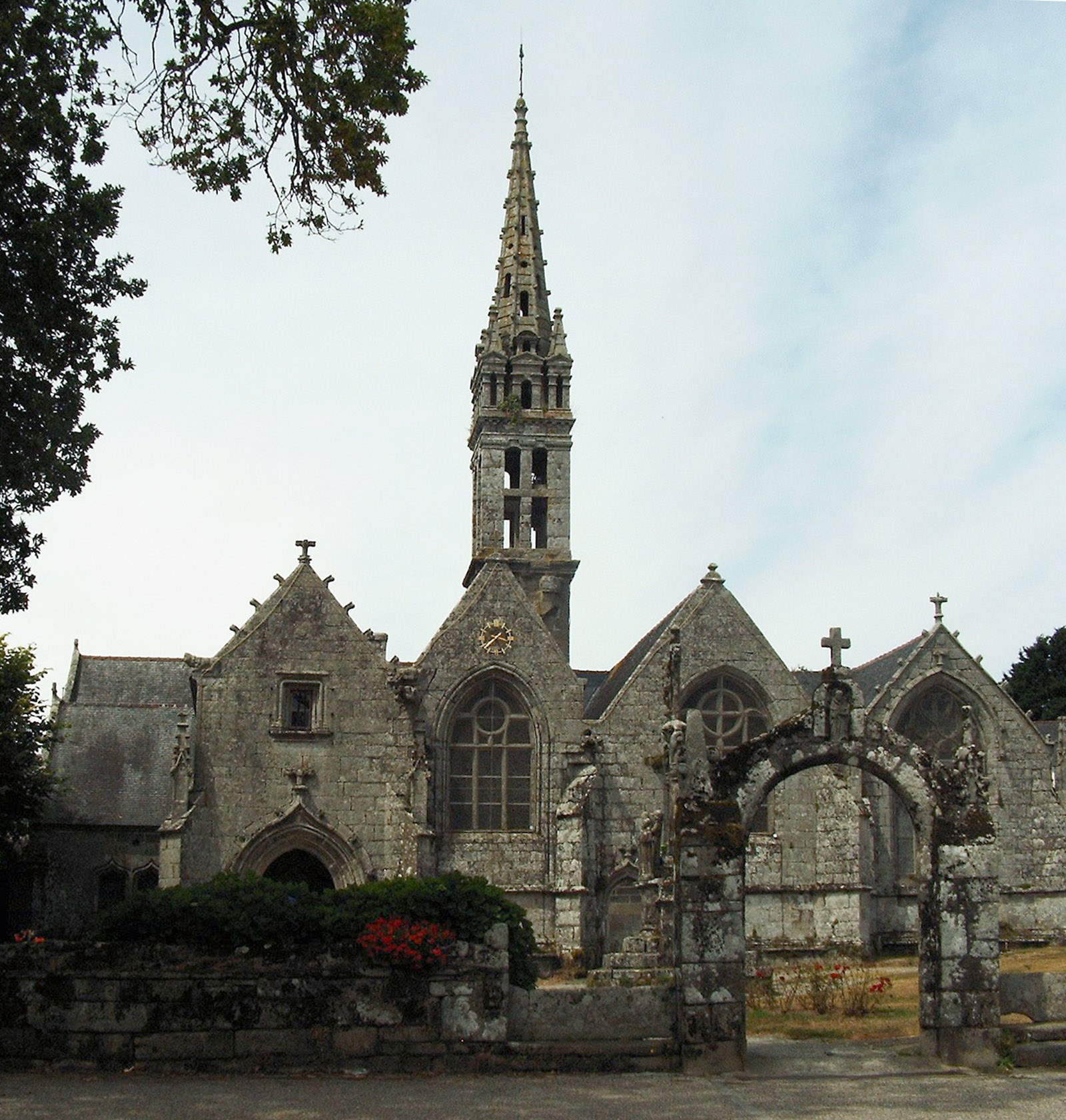 Guengat Kirche